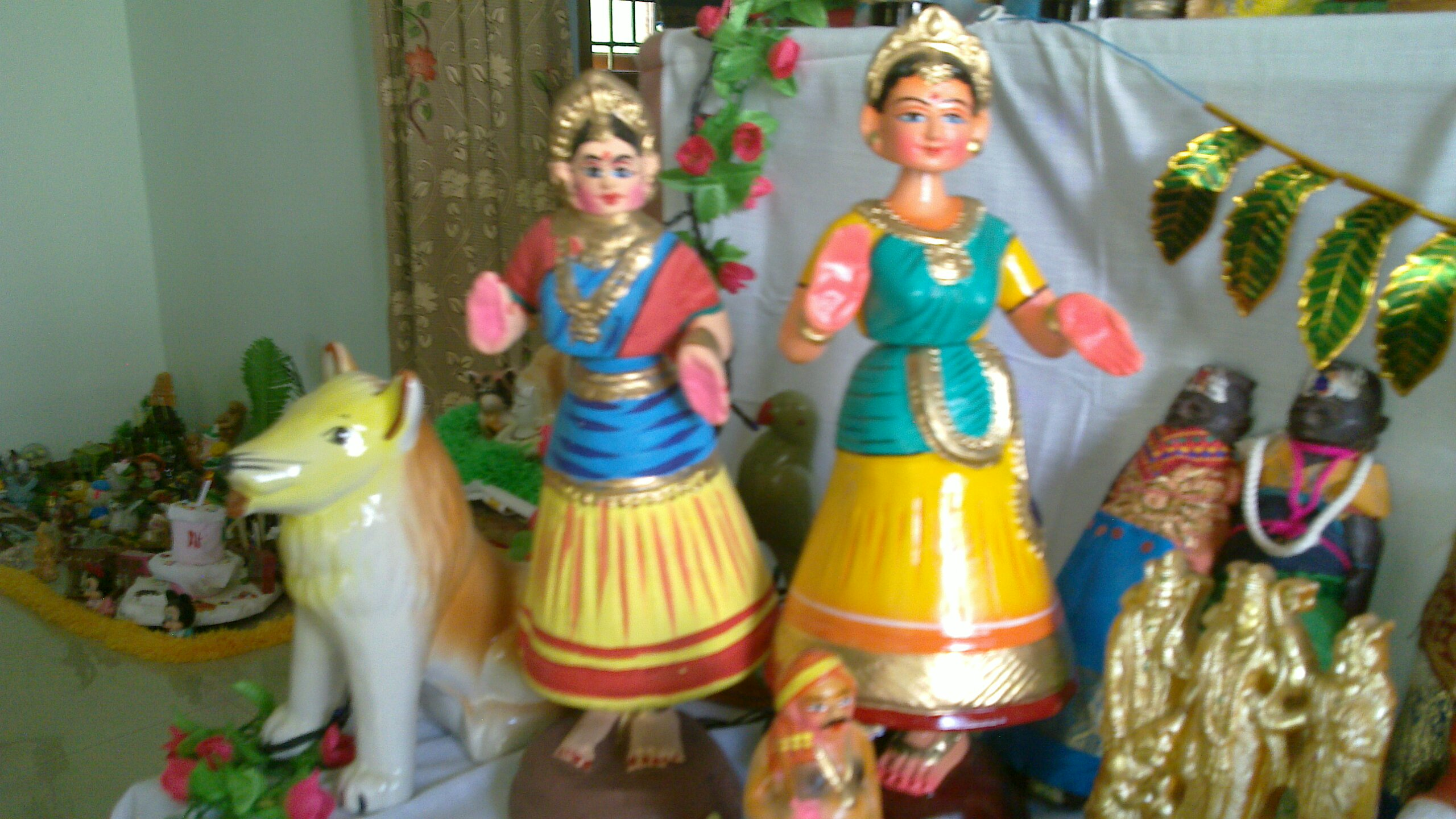 தஞ்சை-நாட்டிய பொம்மைகள்